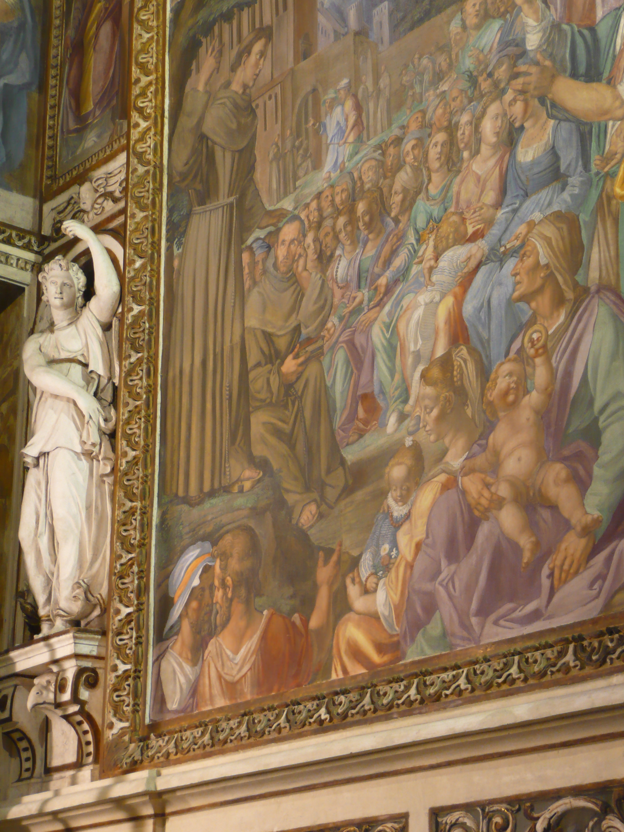 La Cappella di Sant'Antonio da Padova, ottava sul lato destro della navata di Sant'Angelo a Milano